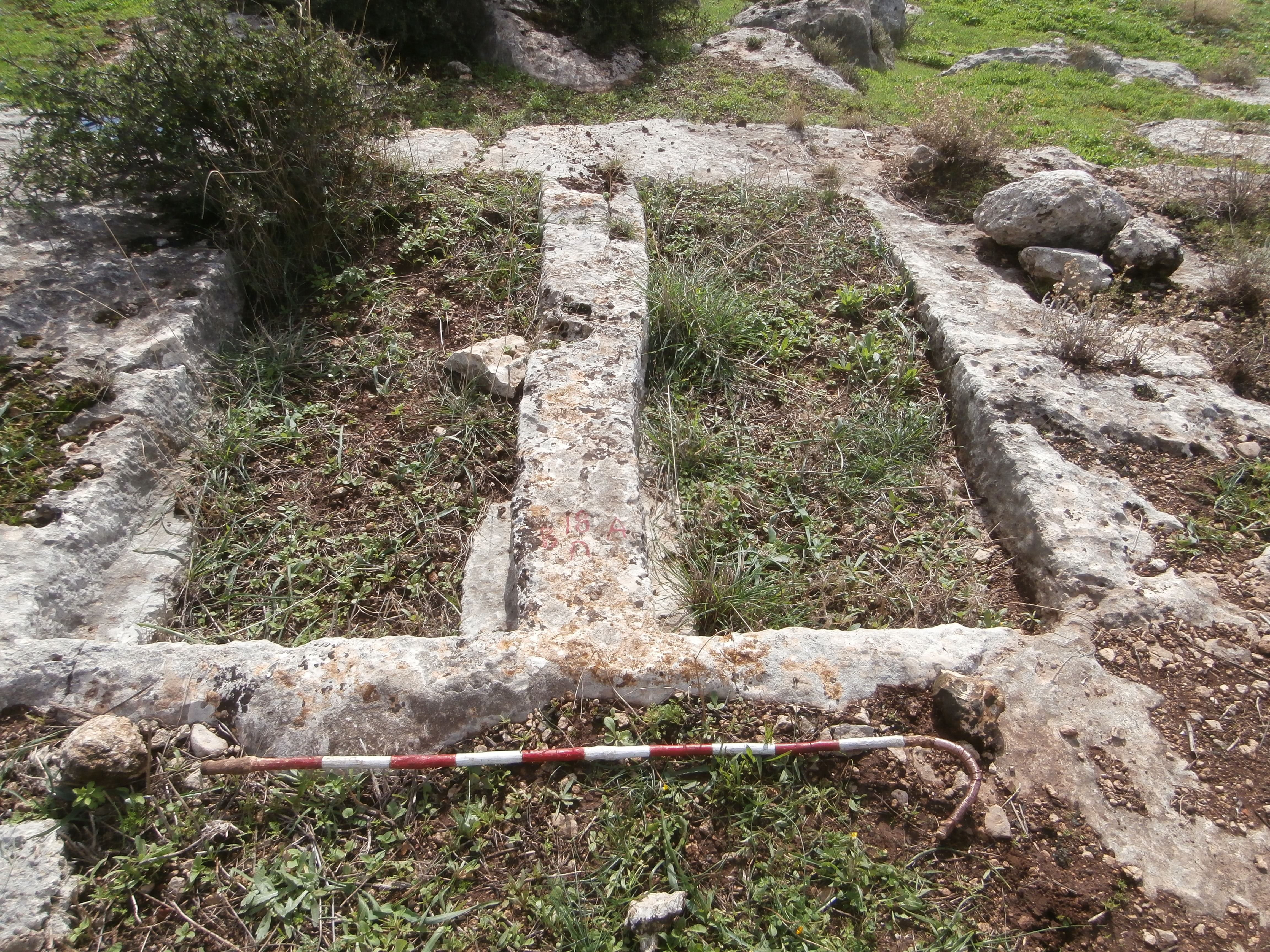 קברים בבית הקברות היהודי העתיק בחוקוק, אתר ארכאולוגי בגליל